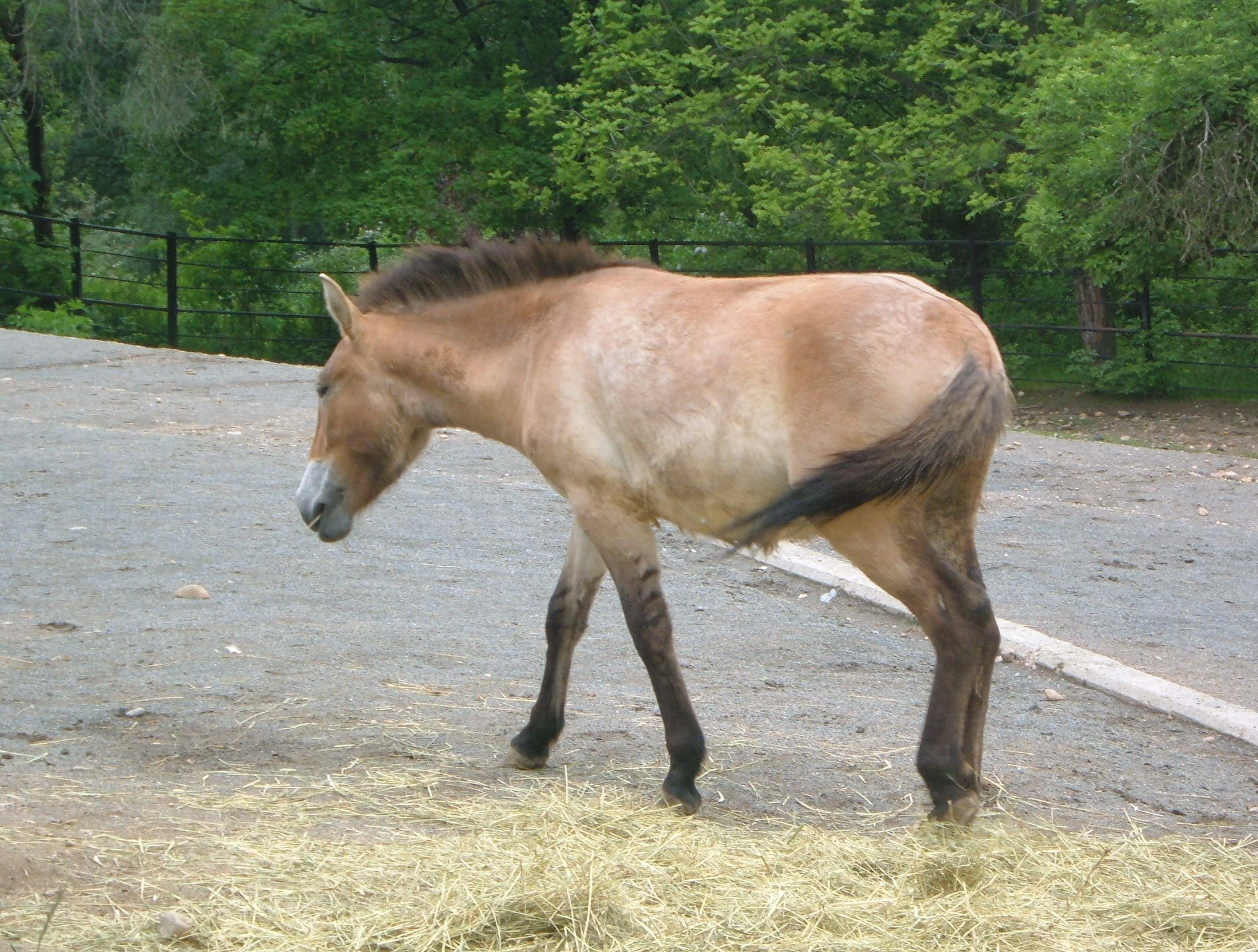 Kůň převalského, vlastni fotografie